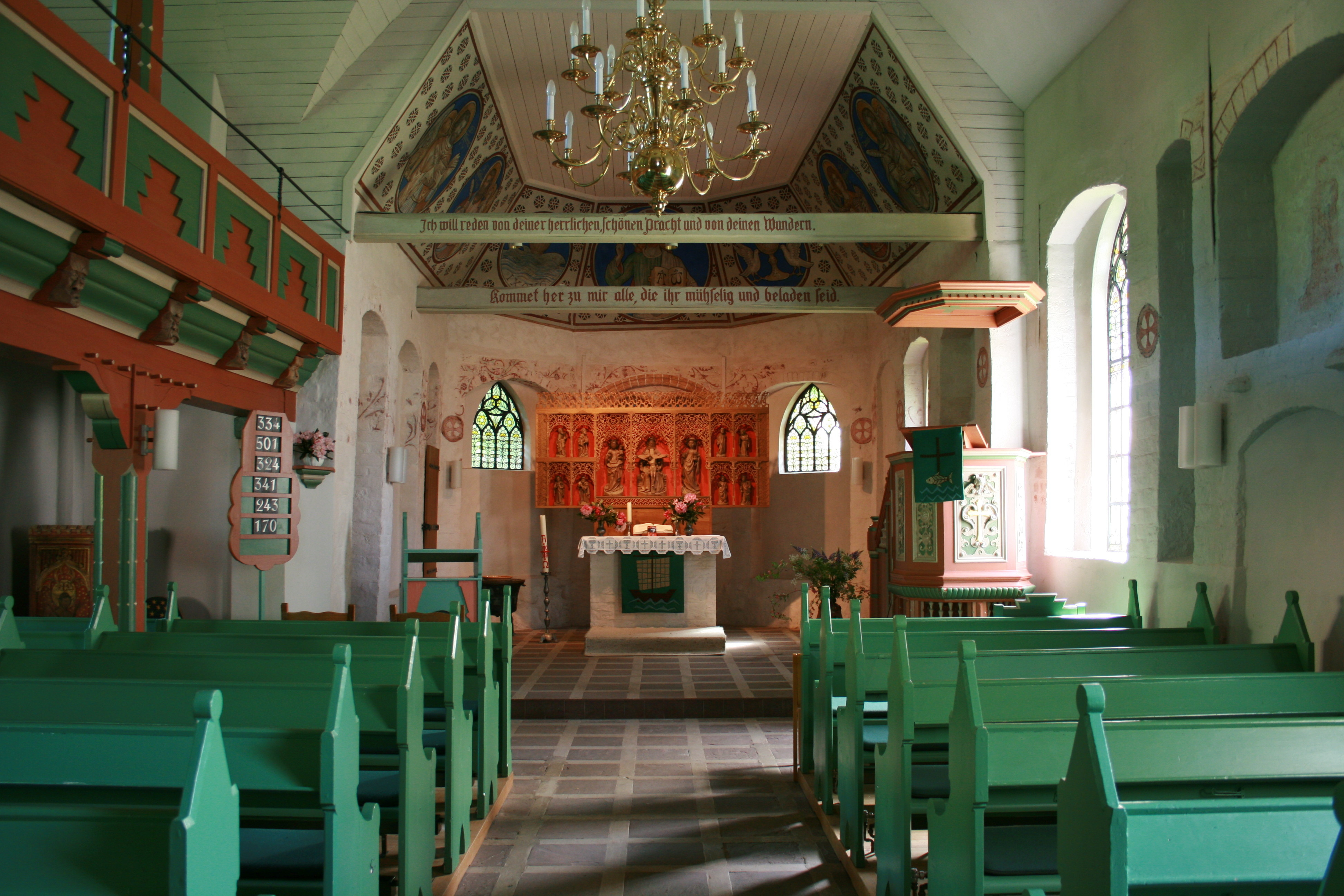 Heilig-Geist-Kirche in Soltau-Wolterdingen